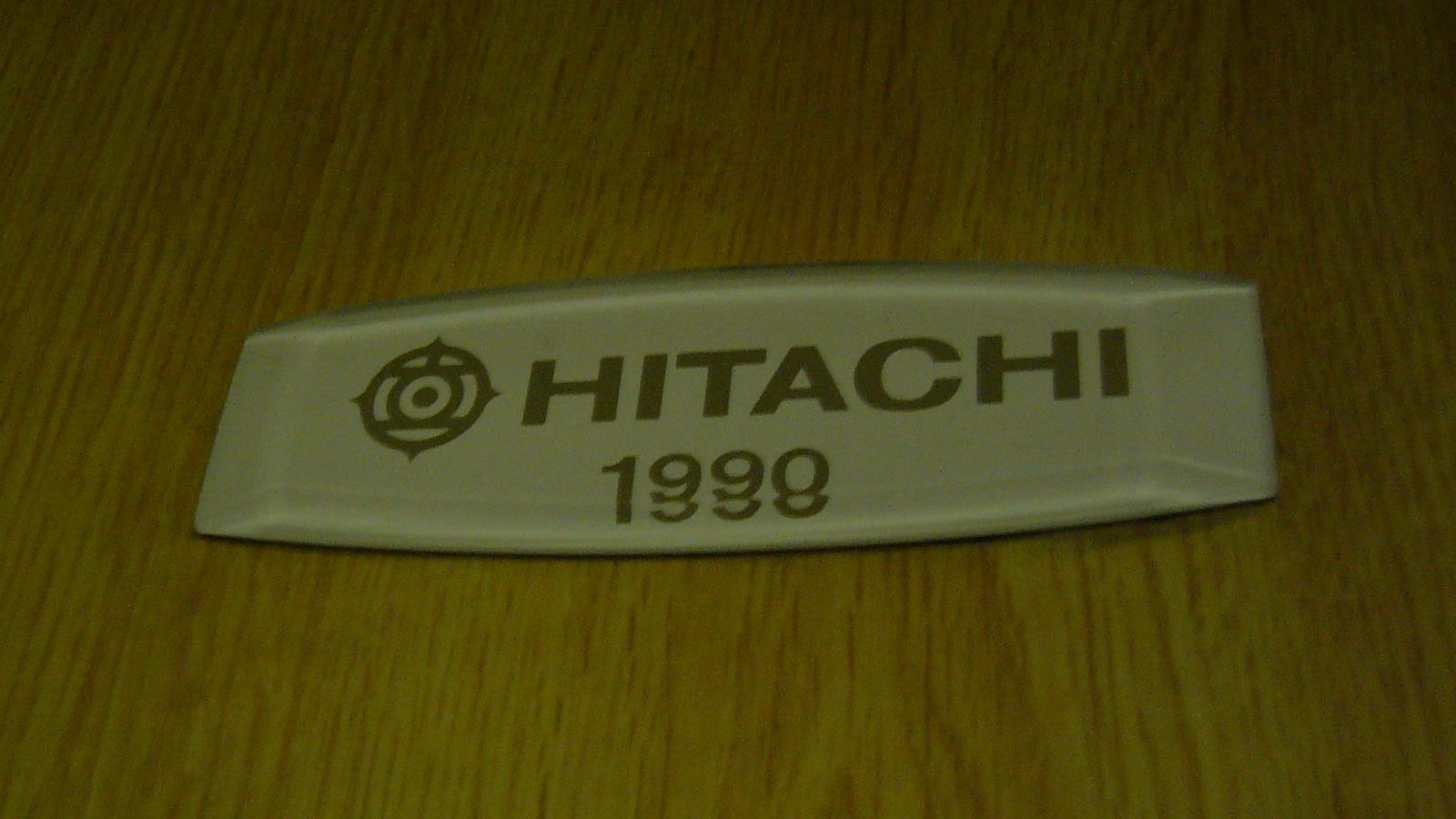 中文（台灣）: 臺灣鐵路管理局柴聯車40DR3086車內的日立銘板。